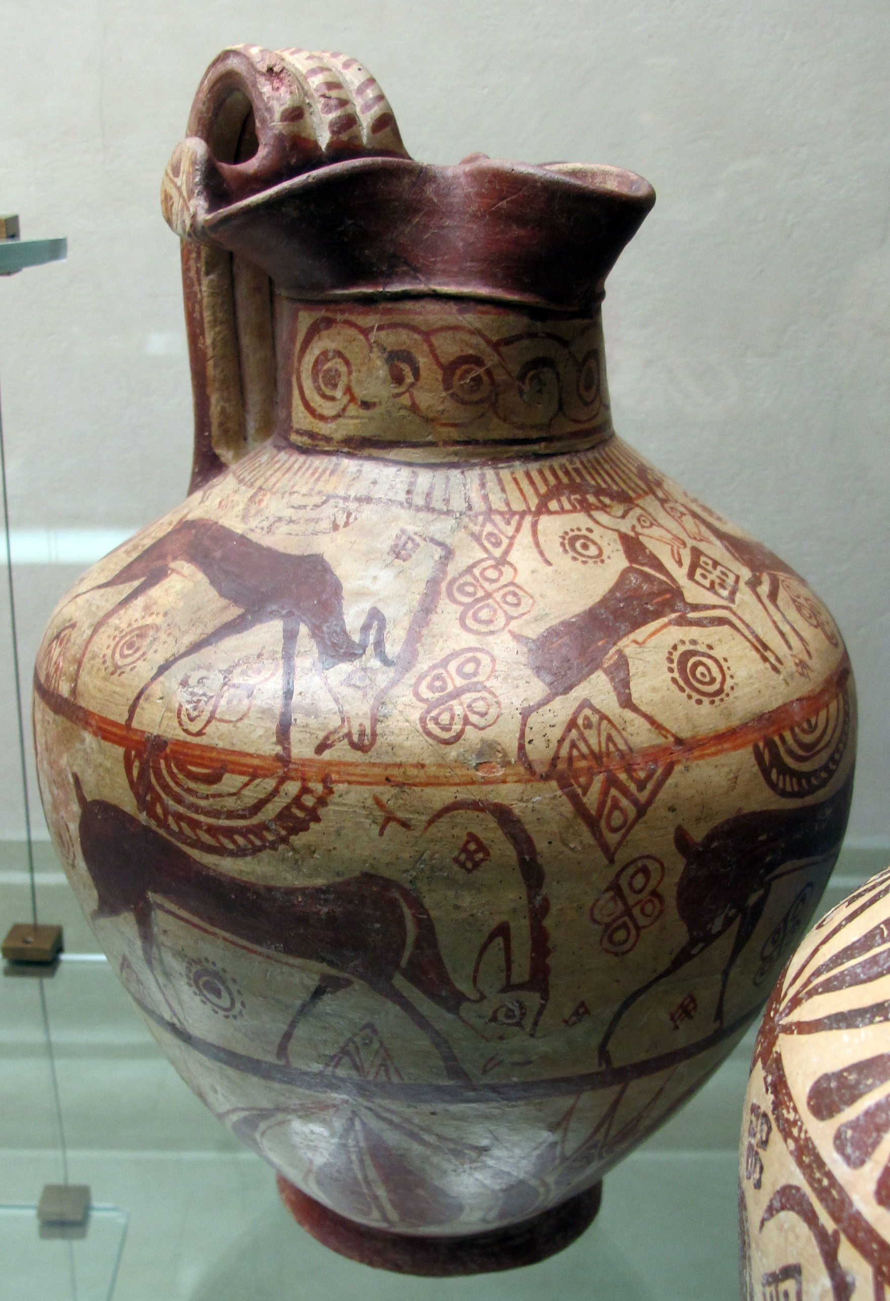 Museo archeologico di Firenze